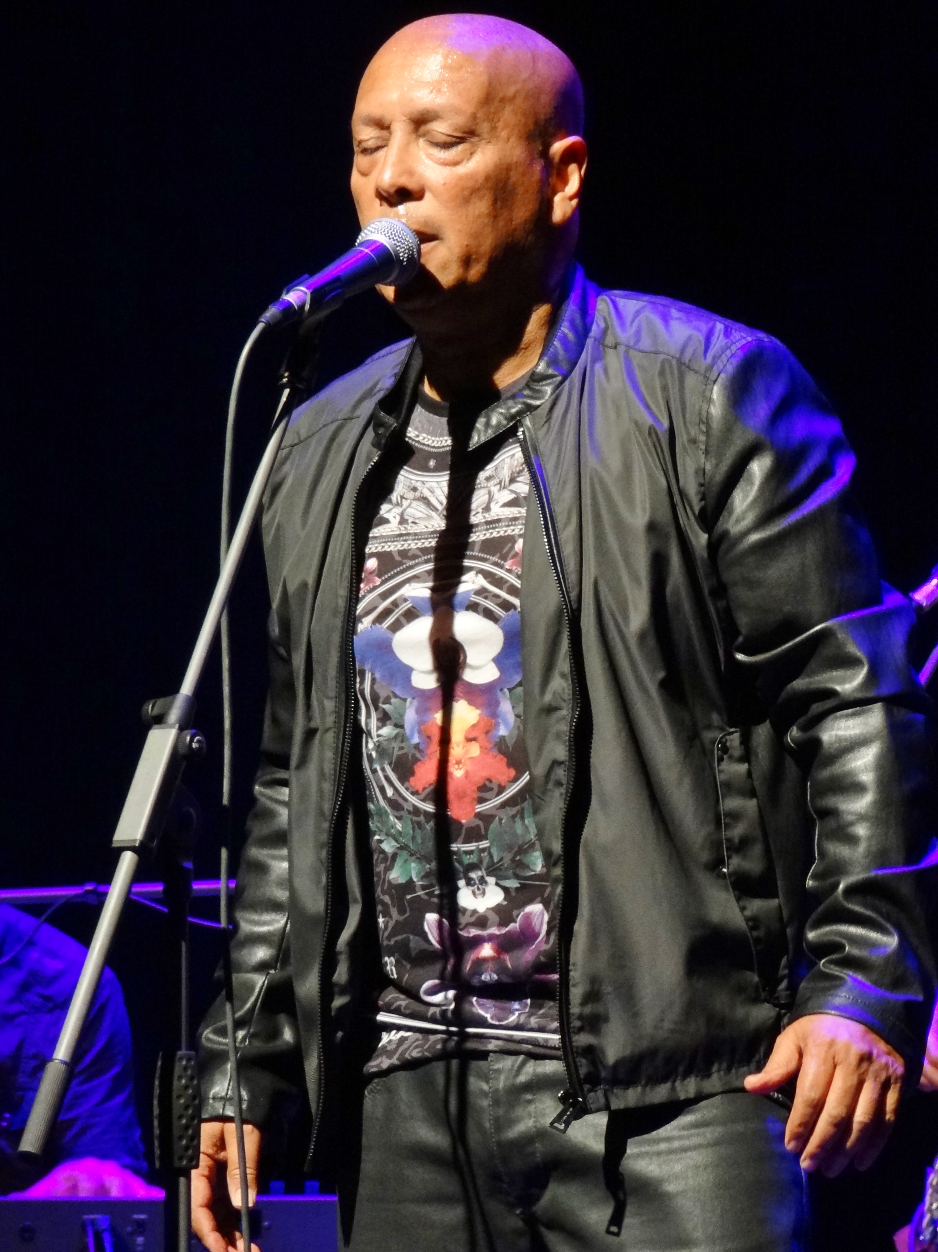 Lenny Zakatek in Artà, Mallorca, Spanien